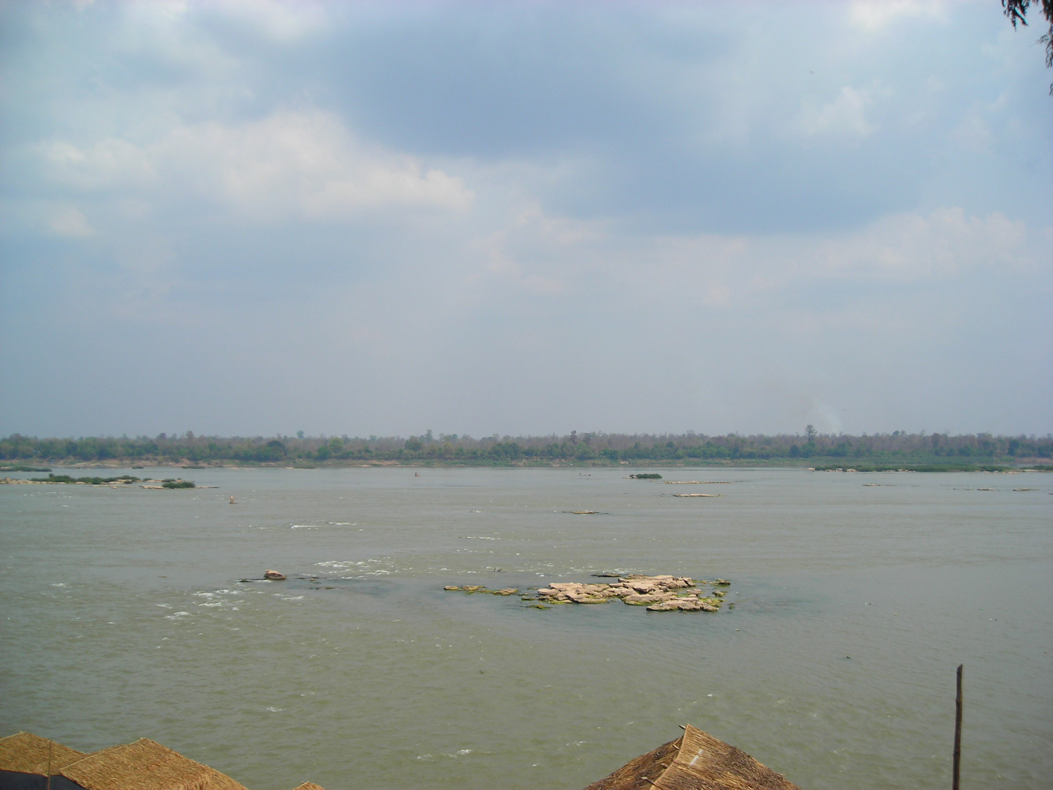 Mekong near Mukdahan